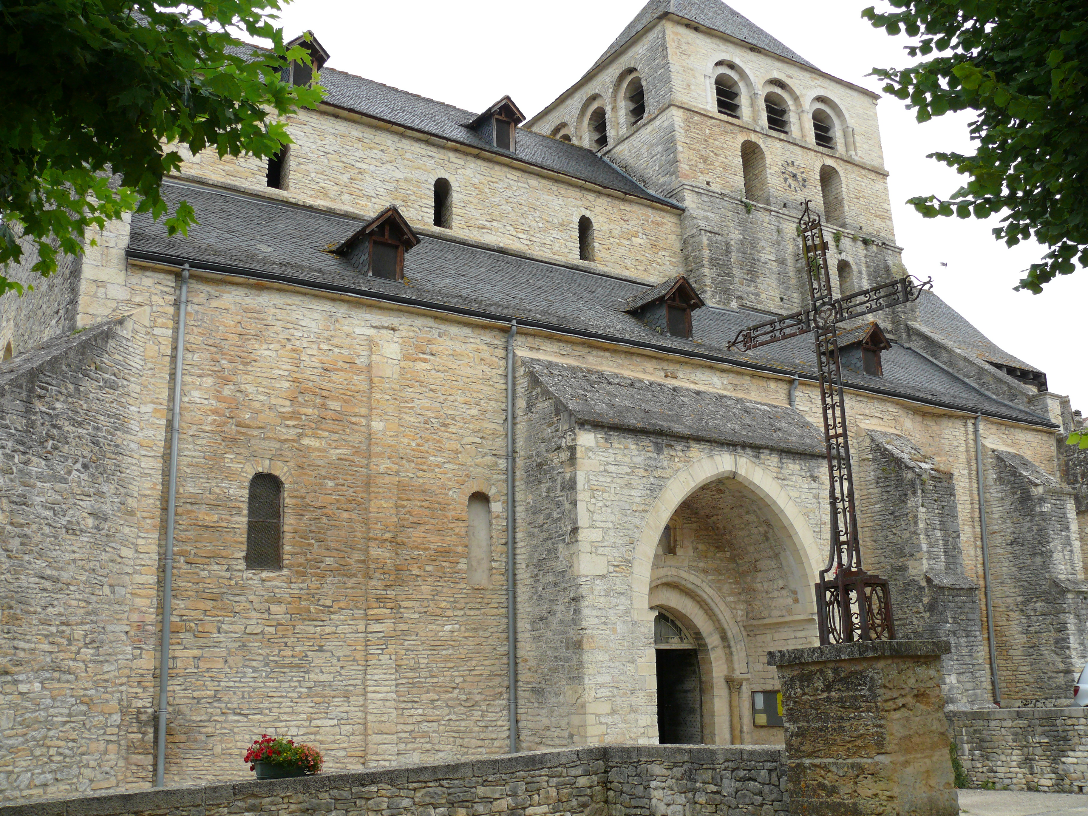 Catus - Eglise Saint-Astier (ancien prieuré Saint-Jean)